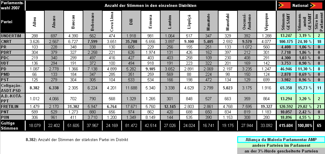 Ergebnis der Parlamentswahl 2007 in Osttimor nach Distrikte aufgeteilt